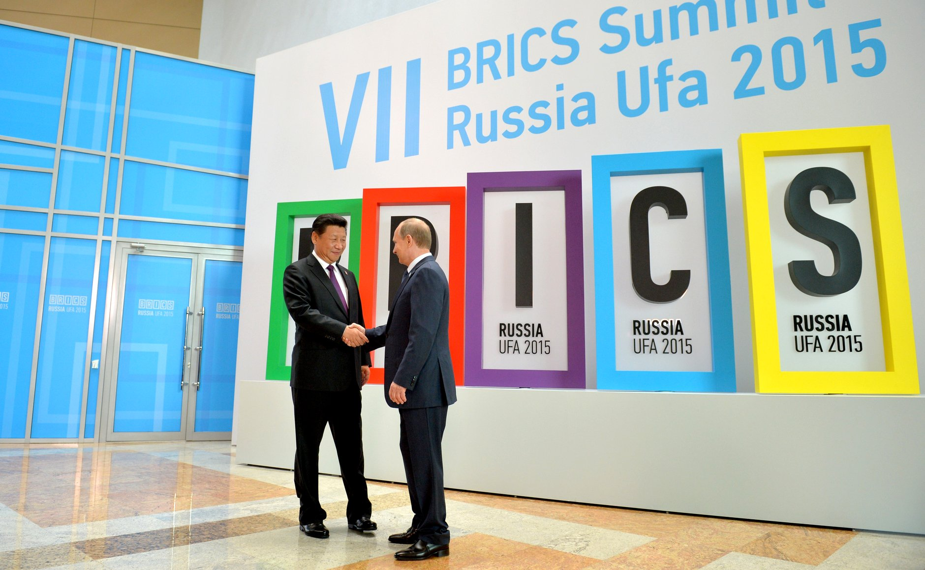 Перед началом саммита БРИКС. Президент России Владимир Путин с Председателем КНР Си Цзиньпином